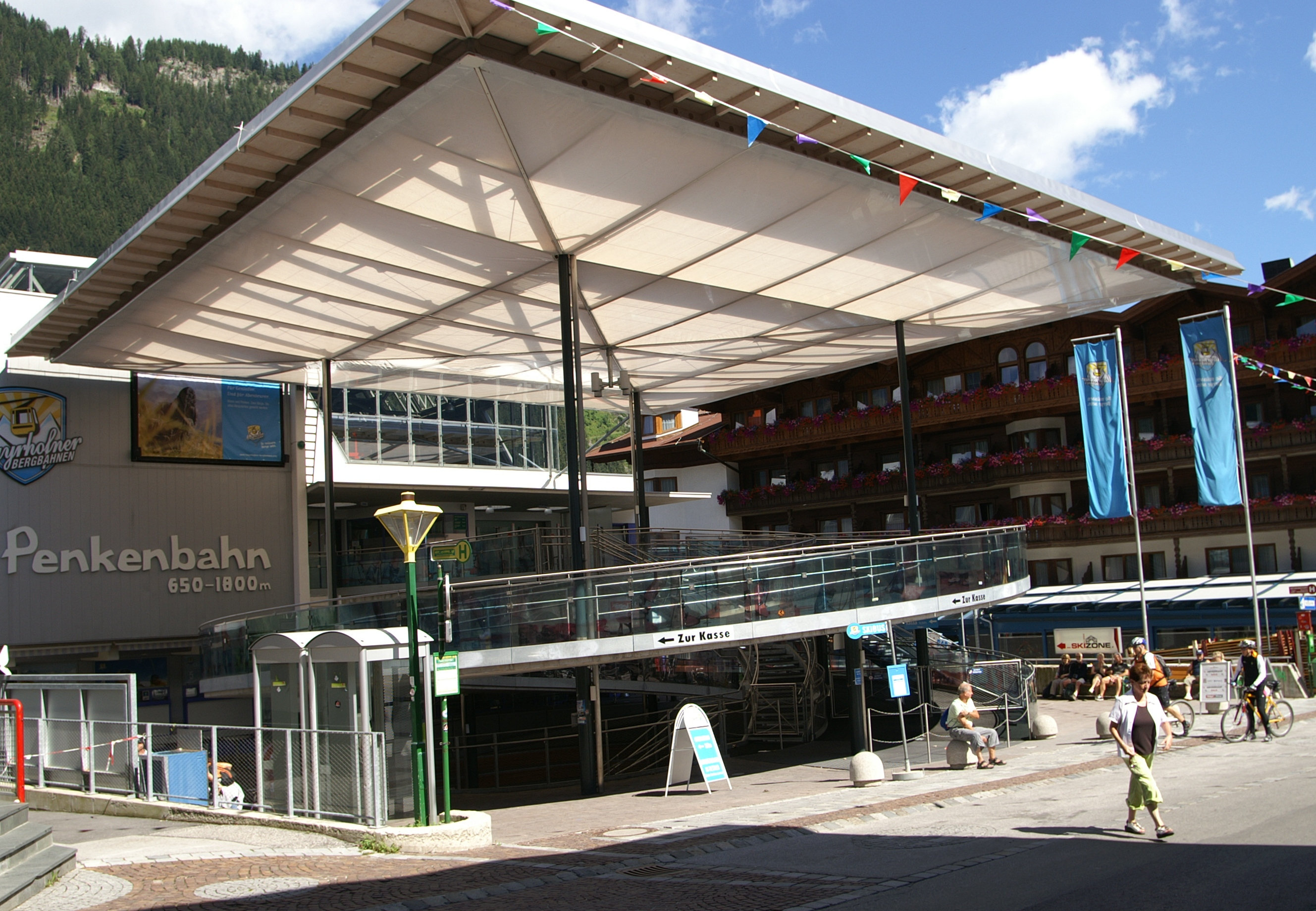 Zillertal Mayrhofen Penkenbahn Talstation